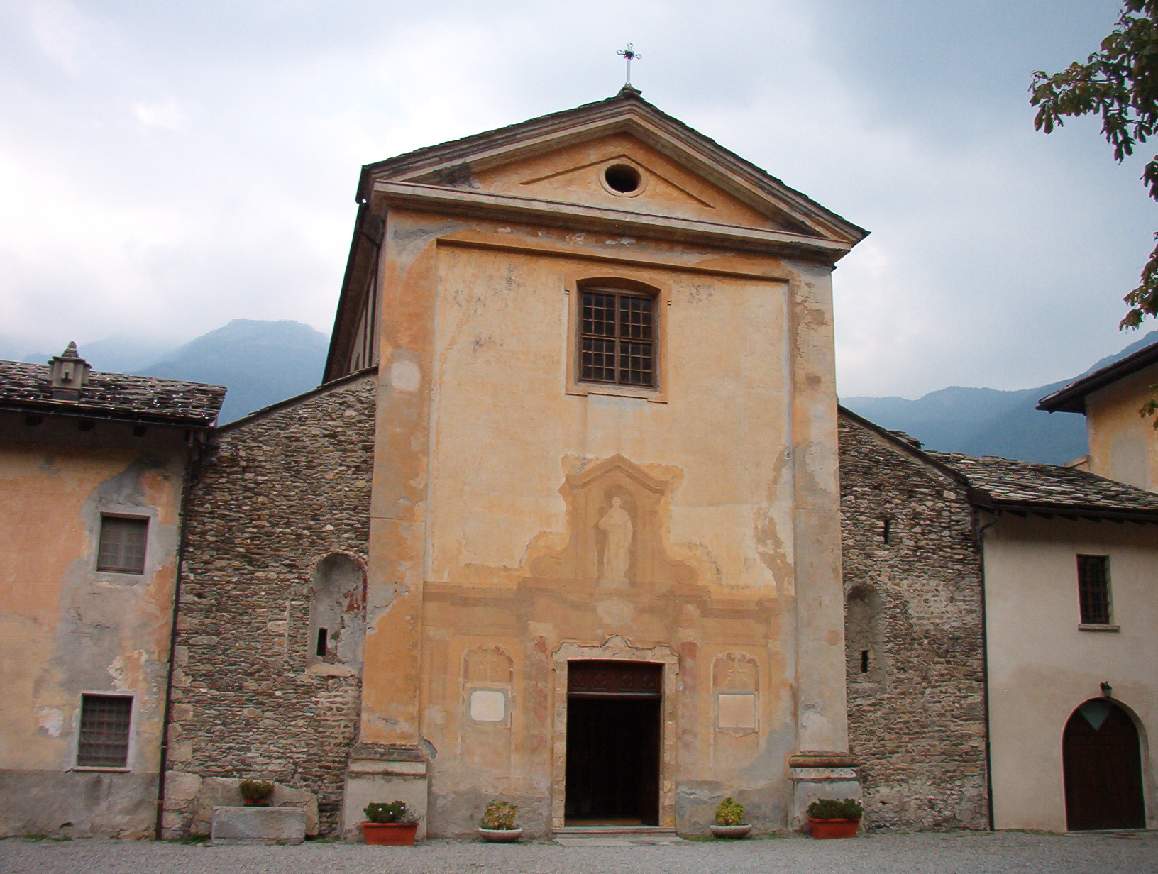 Abbazia di Novalesa - Provincia di Torino - Italy